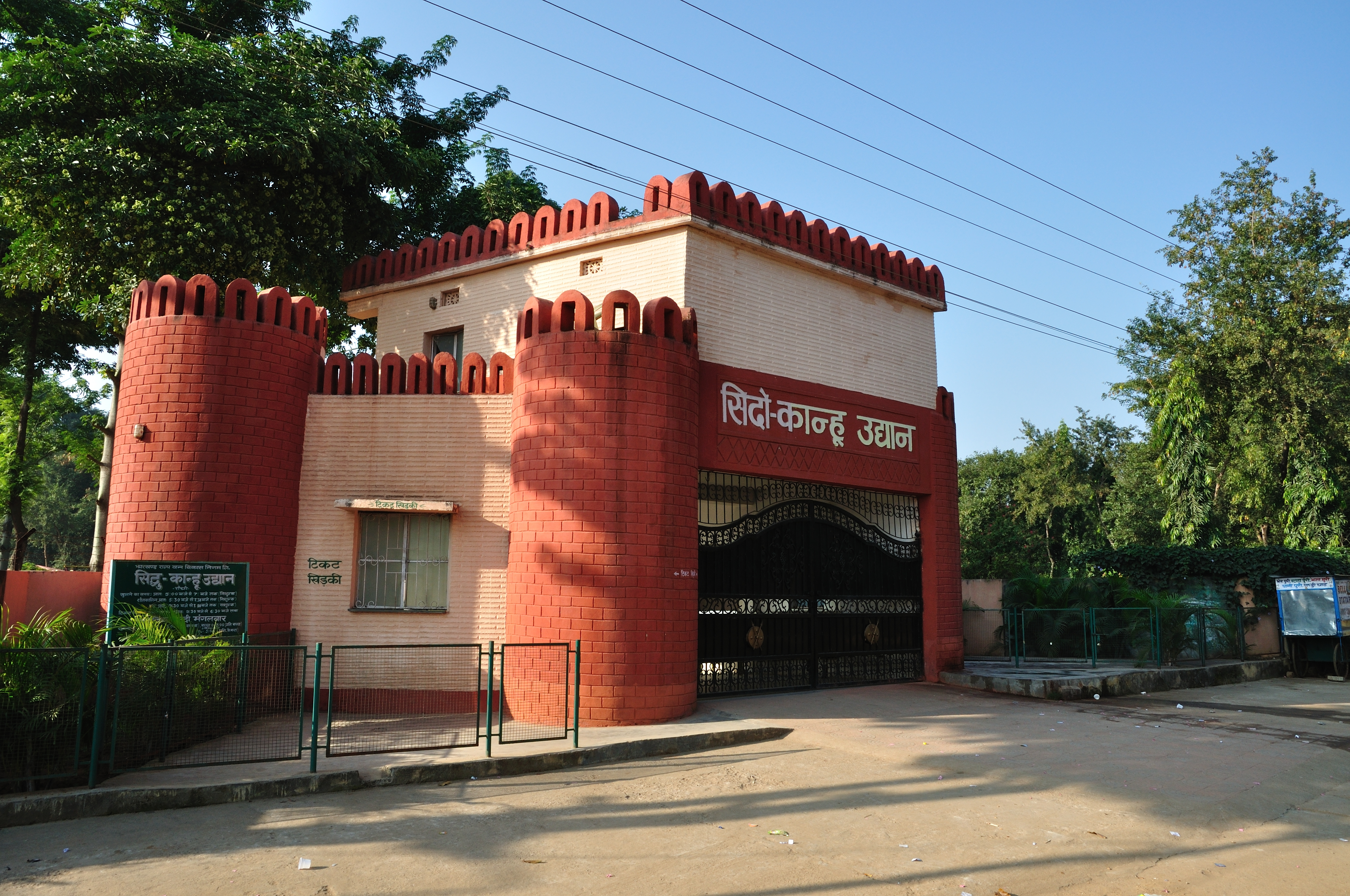 Sidhu Kanhu Park on kanke road, Ranchi.